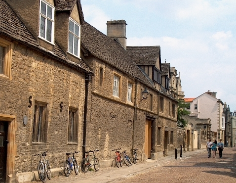 Merton Street Oxford